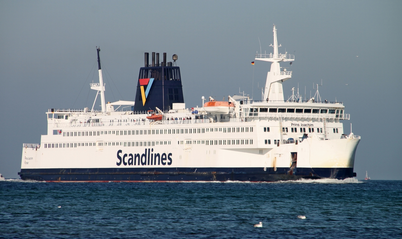 Das Fährschiff "Prins Joachim" (IMO 7803190) der Scandlines beim einlaufen in den Hafen Rostock in Warnemünde.